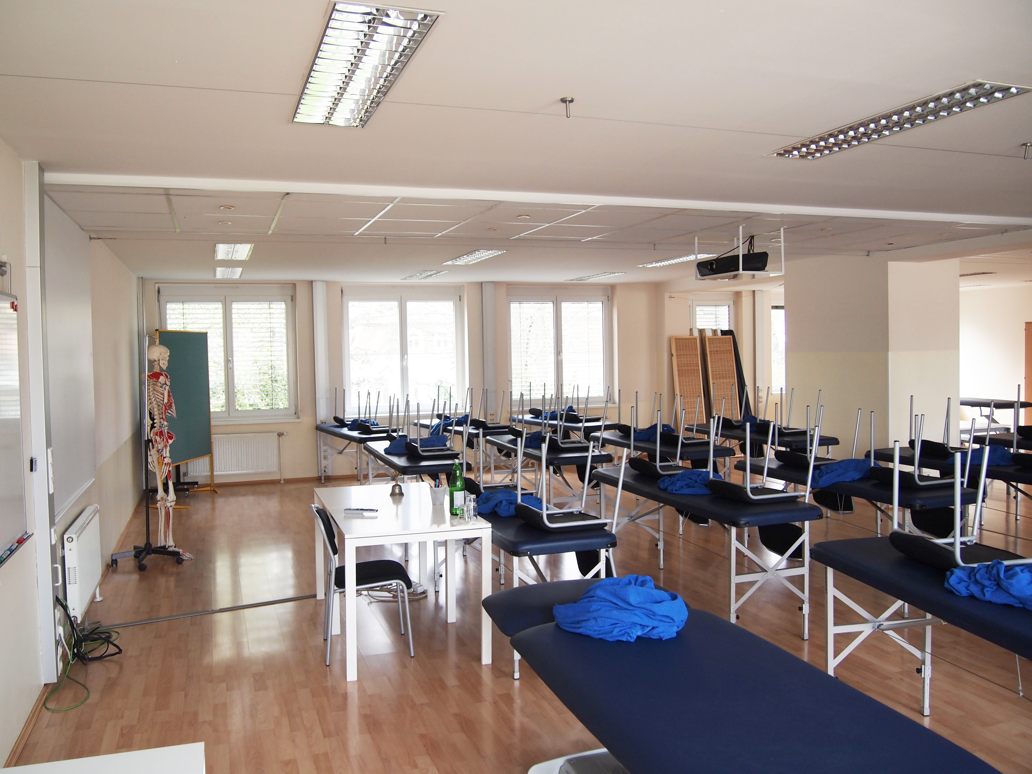 Kursraum der Wiener Schule für Osteopathie